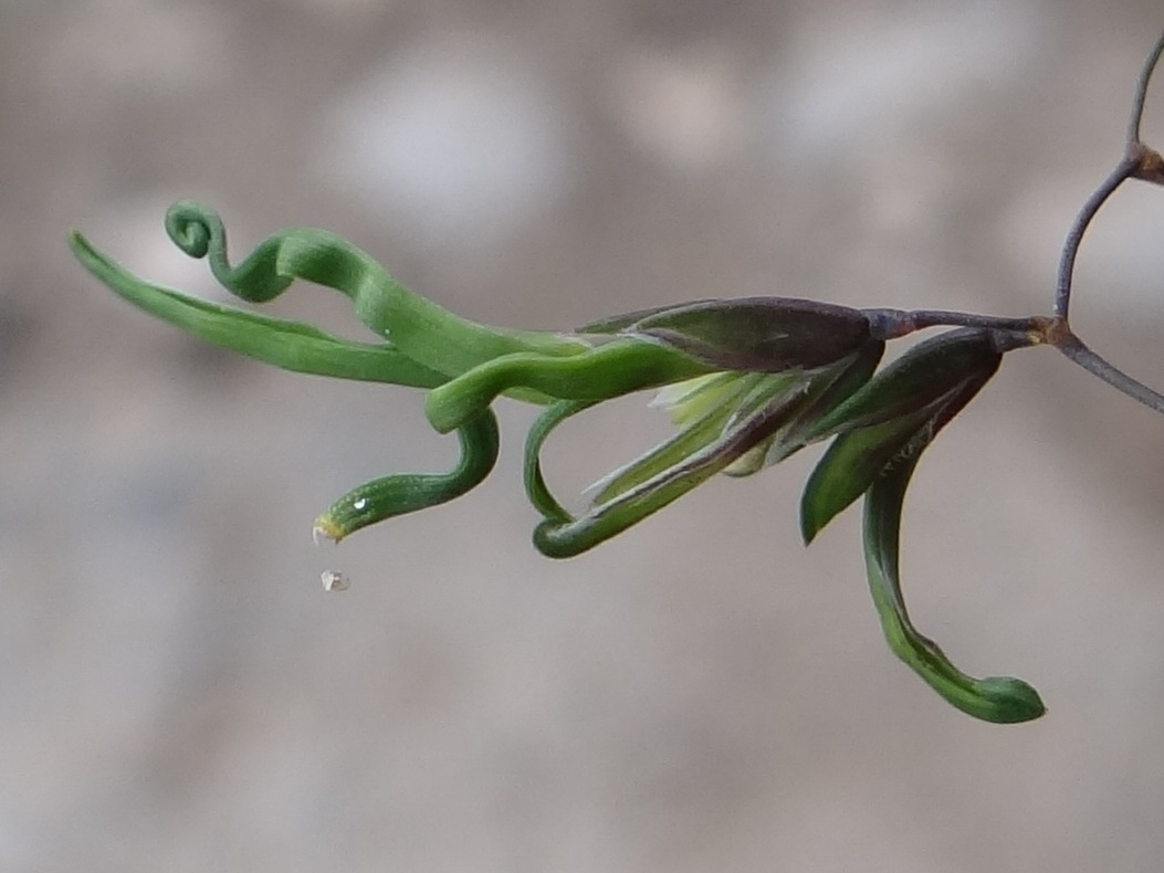 Poa alpina